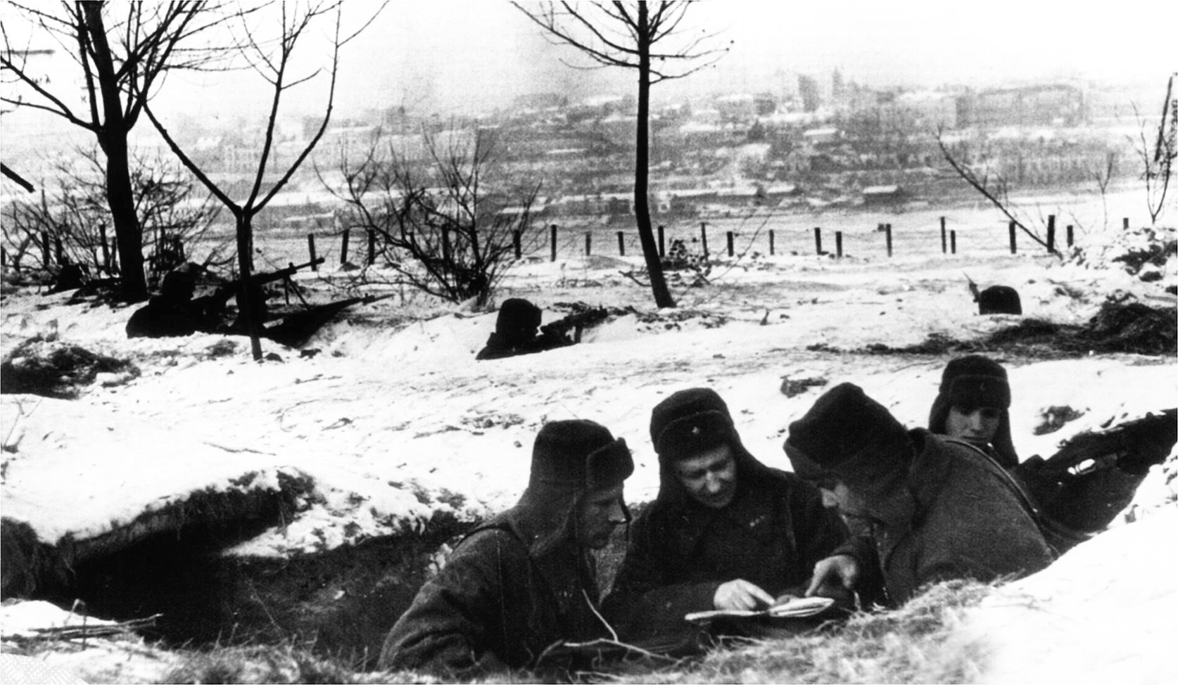 Ростов-на-Дону в оккупации, 1941